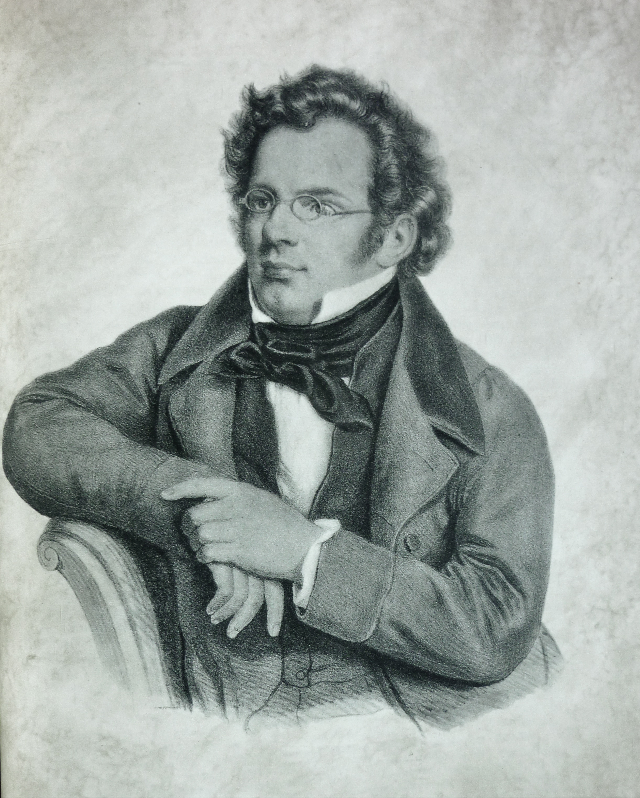 Franz Schubert, Litho von C. Helfert